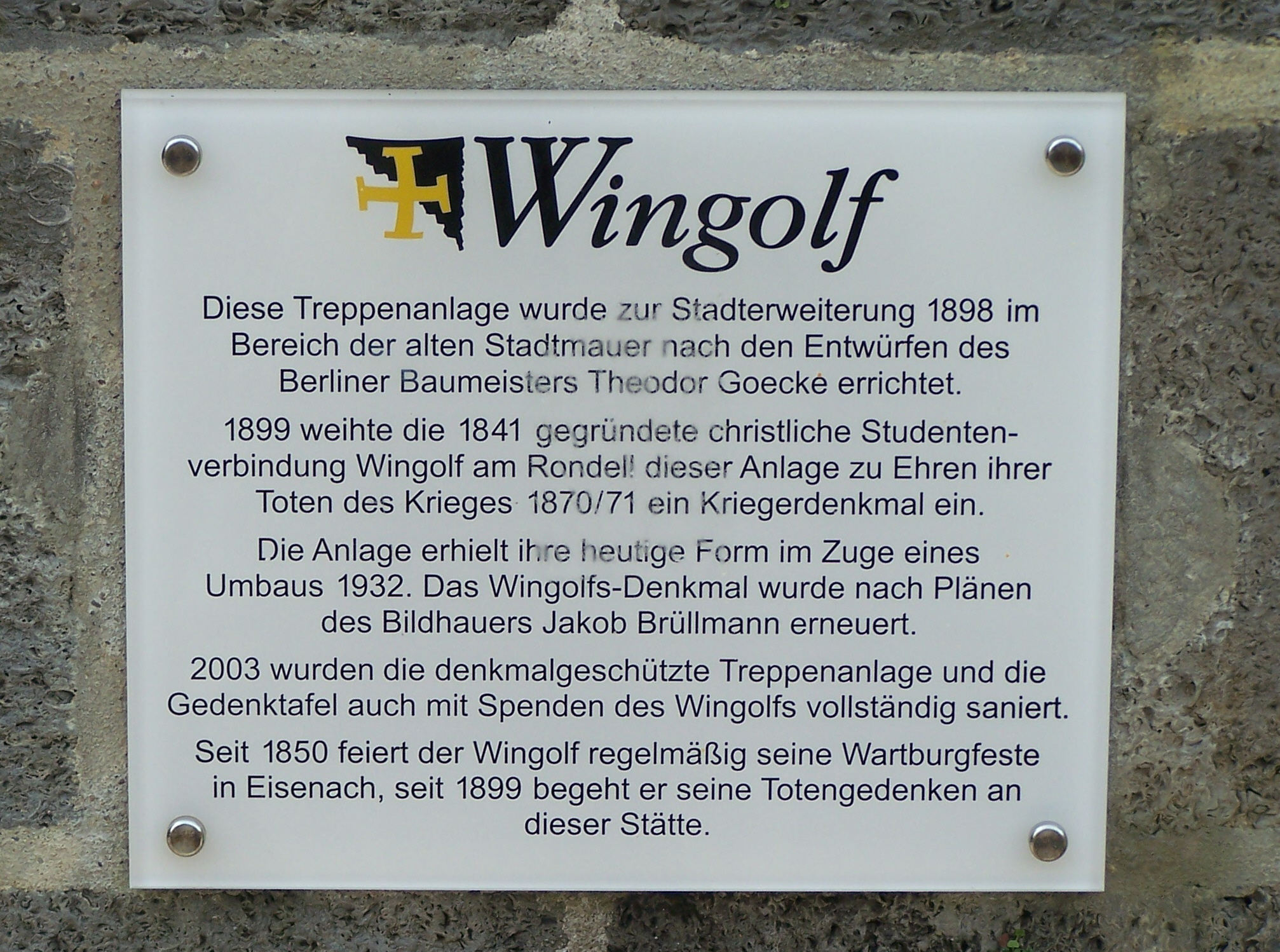 Erläuterungstafel zum Wingolfdenkmal.